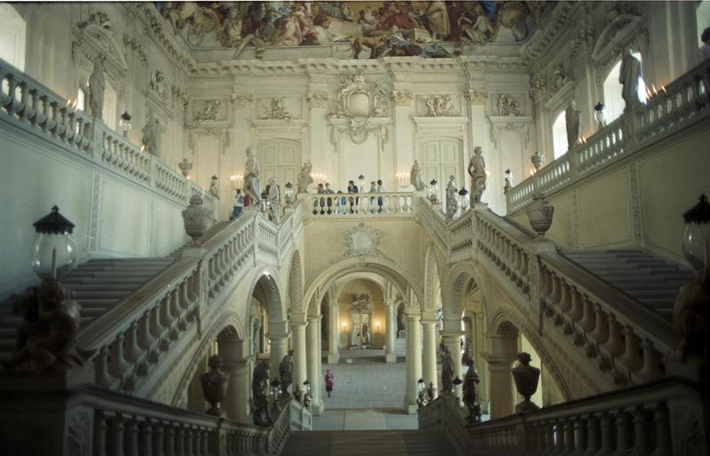 Juni 1988 Würzburg Führung einer Besuchergruppe durch die Residenz